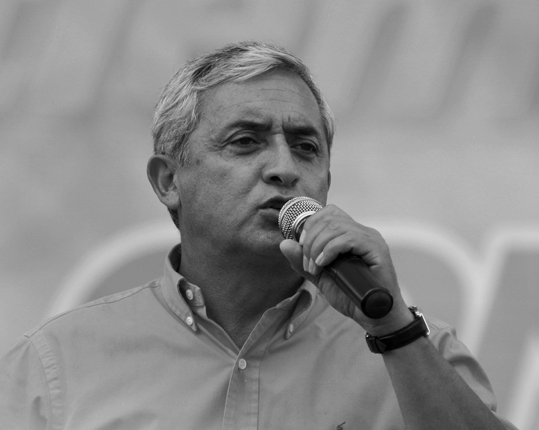 Candidato Otto Pérez Elecciones 2007 (Guatemala Mayo-Septiembre 2007)